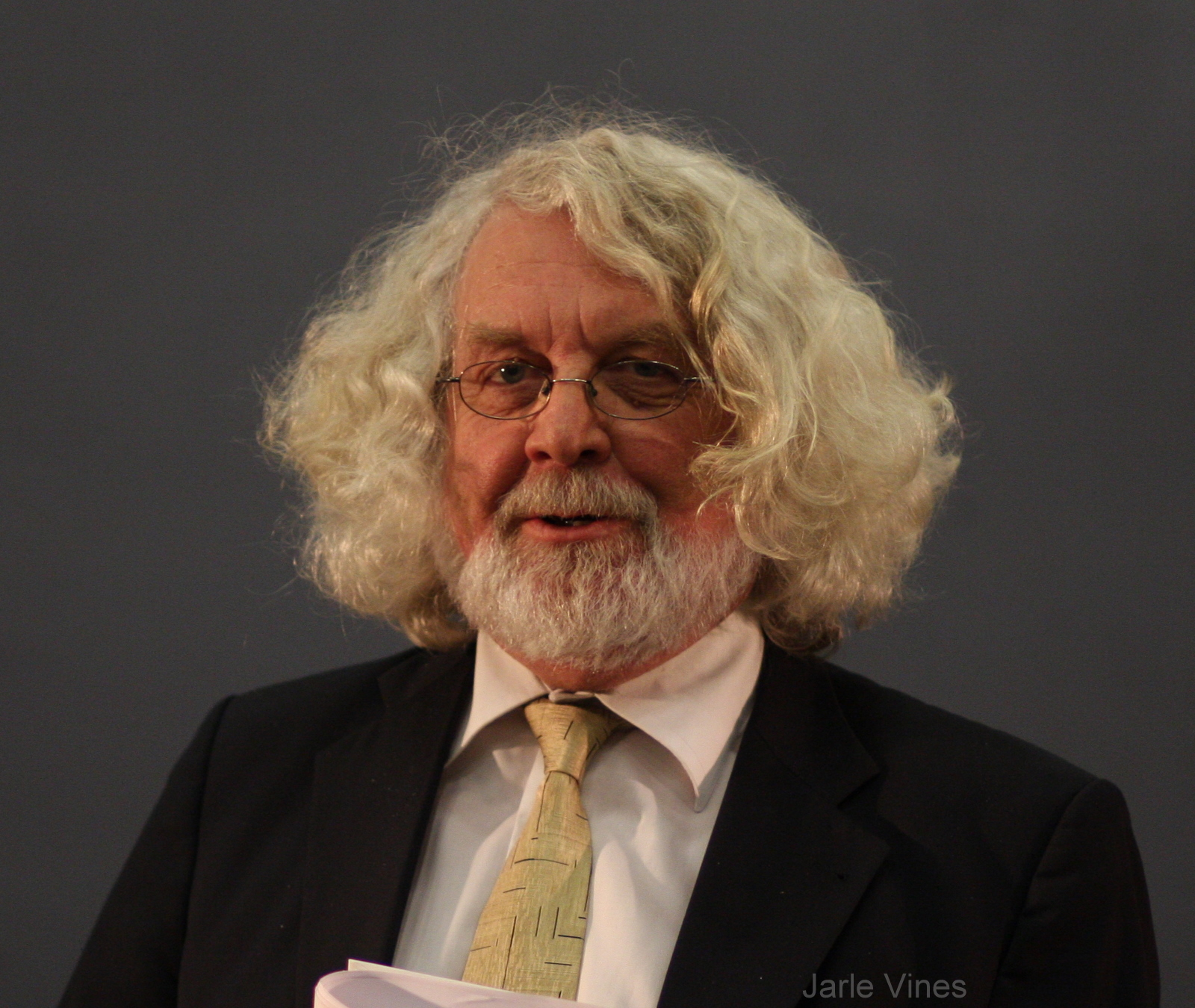 Edvard Hoem norsk forfatter . Med kåseri om Bjørnstjerne Bjørnson og Arne Garborg i forbindelse med åpningen av det nye Time bibliotek